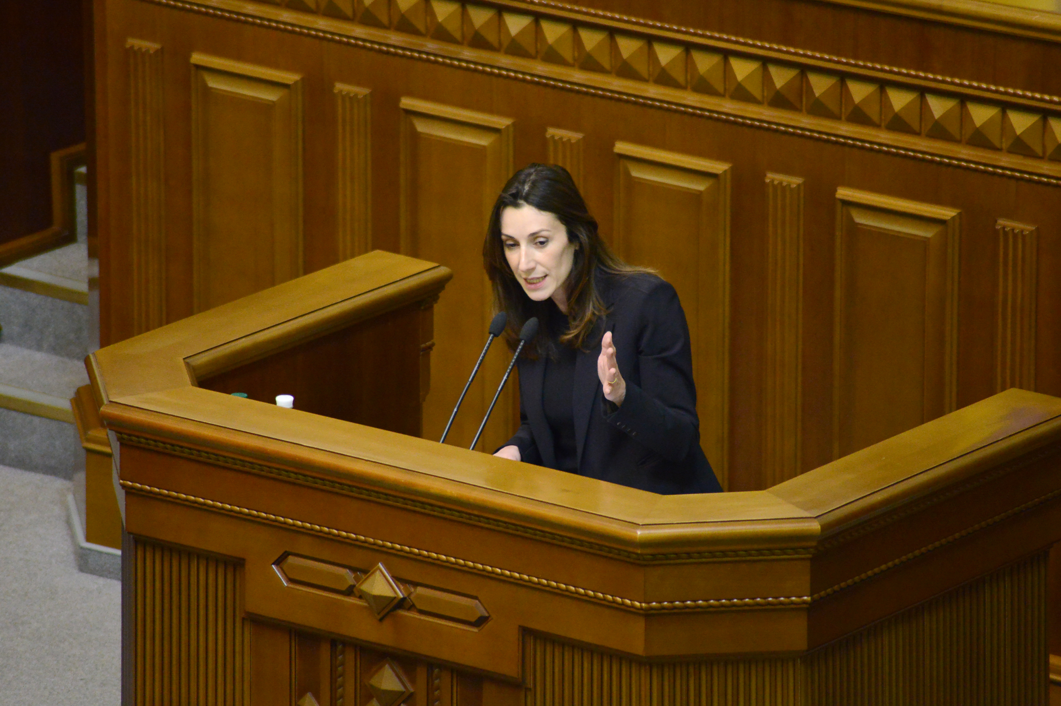 ВЕРХОВНА РАДА УКРАЇНИ 2015 фотограф Вадим Чуприна